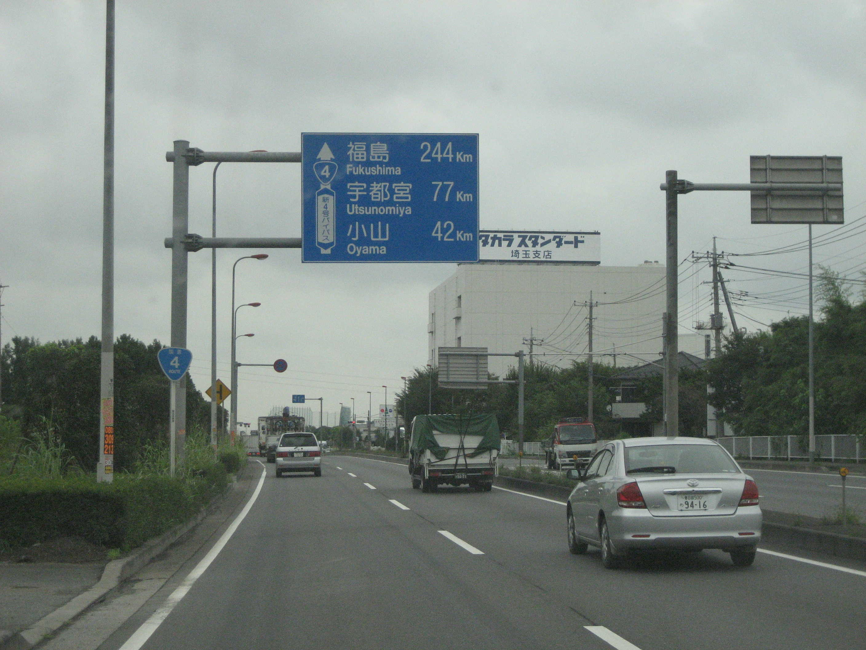 春日部市内